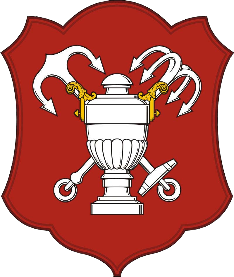 Герб Санкт-Петербургской избирательной комиссии